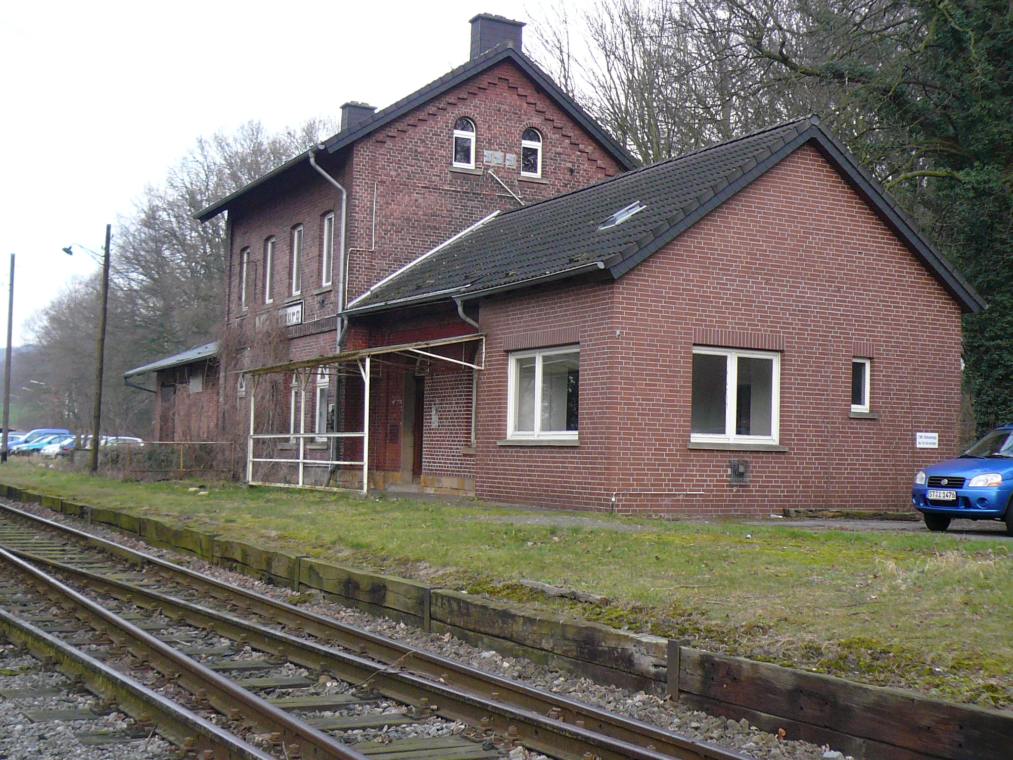 Bahnhof Tecklenburg